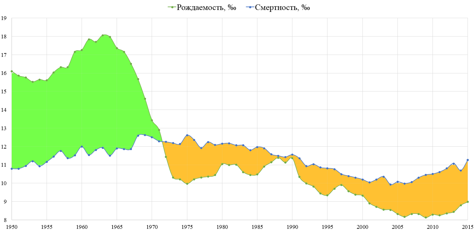 Естественное движение Германии (на 1000 чел)